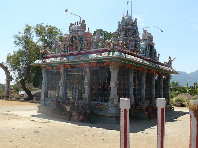 கிராமத்தில் காணப்படும் மந்தை முத்தாளம்மன் திருக்கோயில்